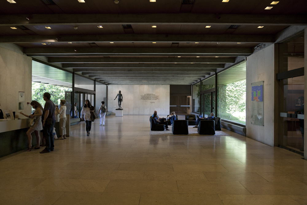 Fundação Calouste Gulbenkian, entrada do Museu, 2013